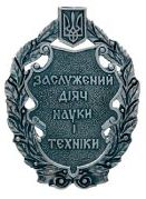 Заслужений діяч науки і техніки України